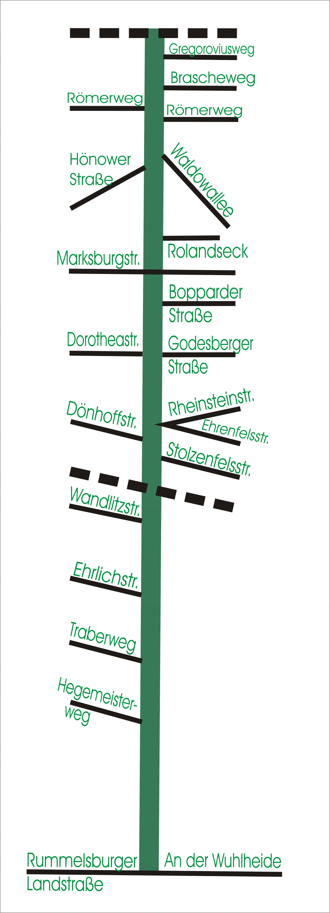 Die Treskowallee in Berlin-Karlshorst mit Nebenstraßen; vereinfachte Darstllung